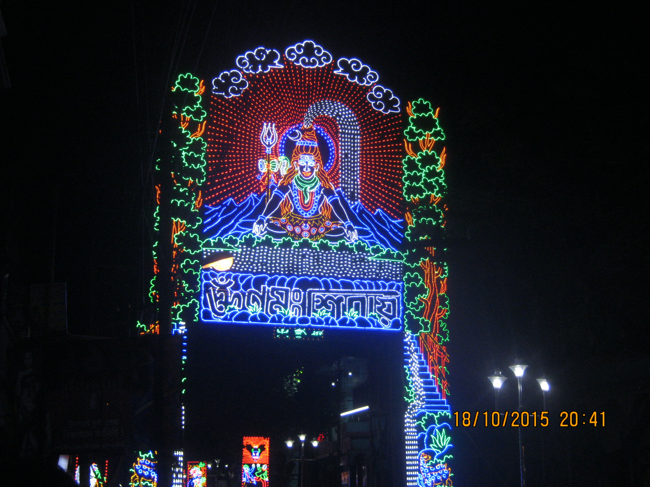 Serampore- 712201 Bengal